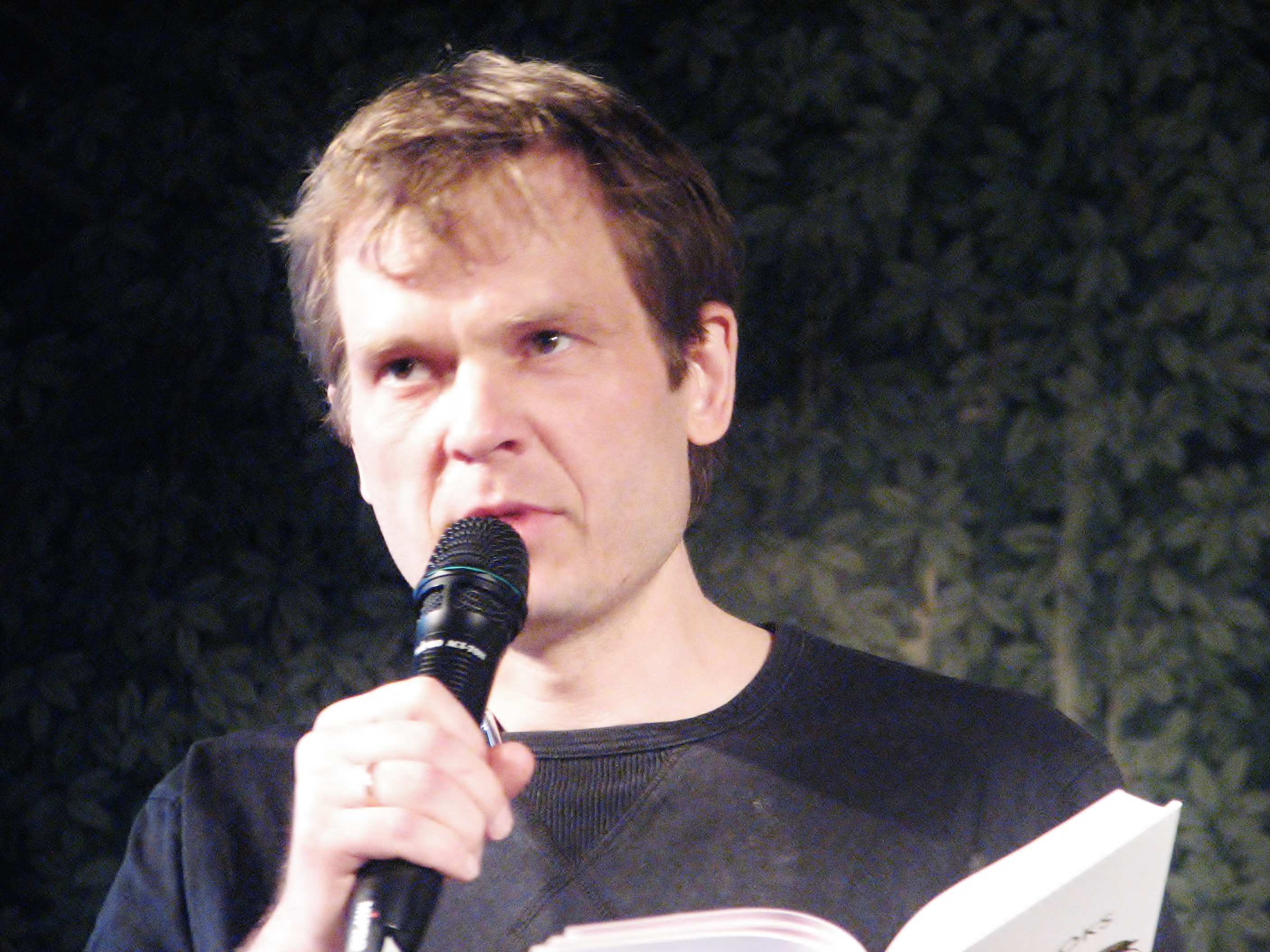 Jüri Kolk esinemas HeadReadi proosavõistulugemisel Tallinna kirjanike maja musta laega saalis